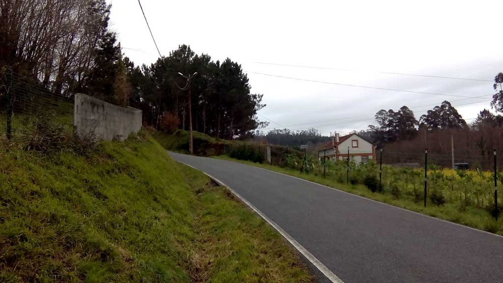 Vista de Pielas, Doso, Narón.